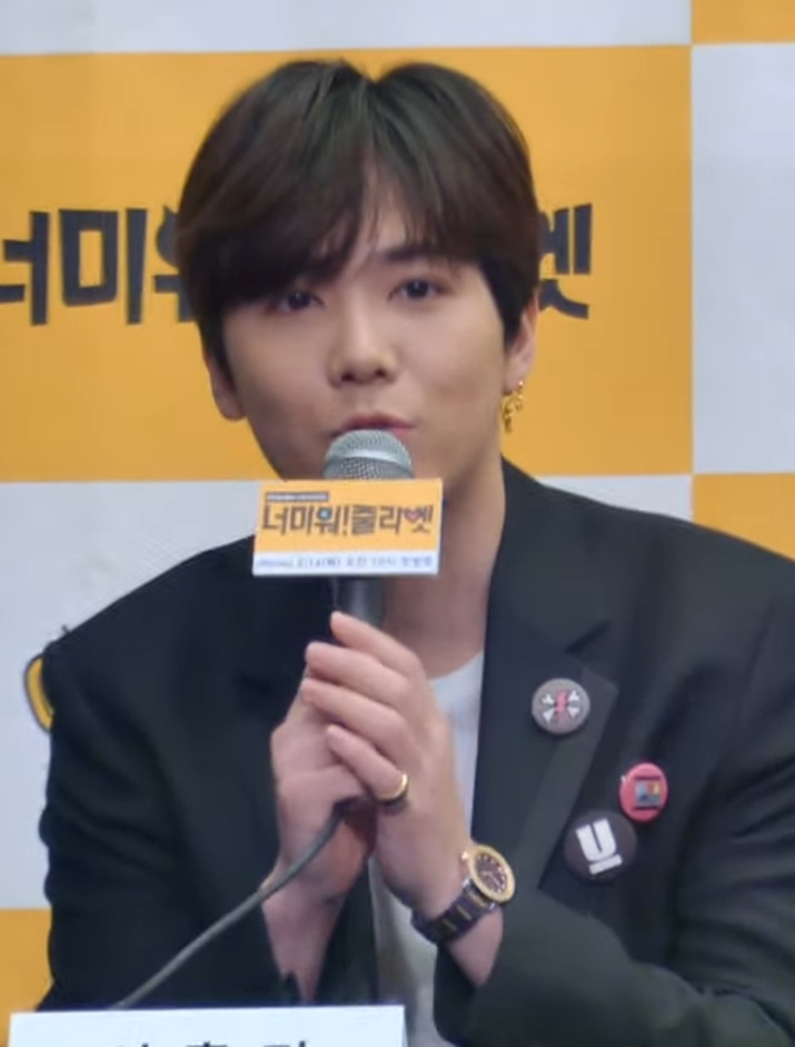 8일 오후, 서울시 마포구 상암동 '스탠포드호텔 서울'에서 옥수수 오리지널 '너 미워! 줄리엣' 제작발표회가 열려 김정권PD, 배우 한상진, 최웅, 문수빈, 이홍기, 정혜성이 참석해 각 배역 캐릭터를 설명하고 있다.